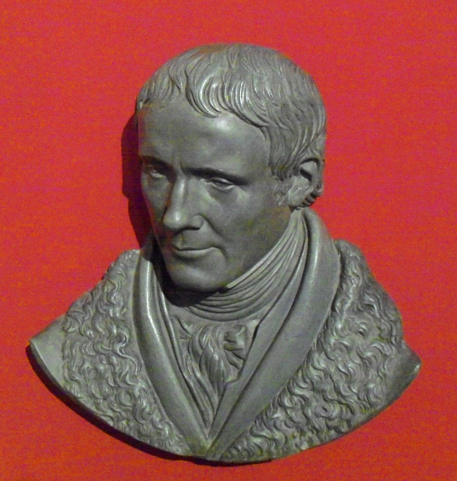 Wizerunek Johna Baildona, znajdujący się w Muzeum Historii Katowic. Zdjęcie wykonane podczas Nocy Muzeów 2011.